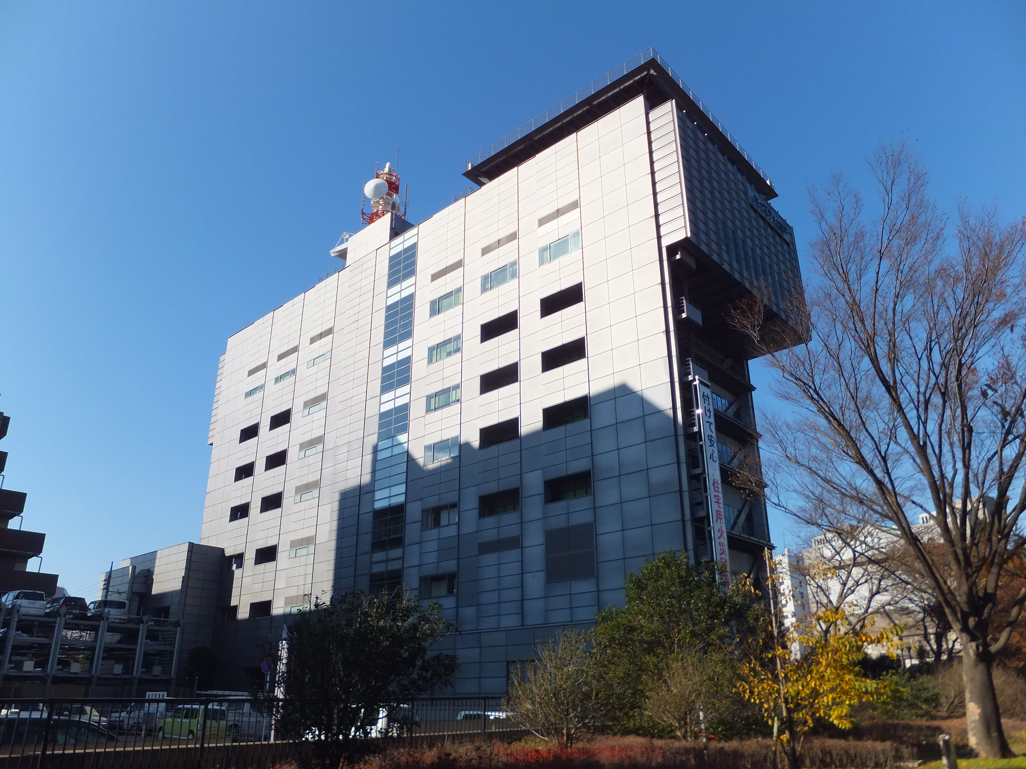 千葉市消防局、千葉市中央消防署などが入居するセーフティーちば